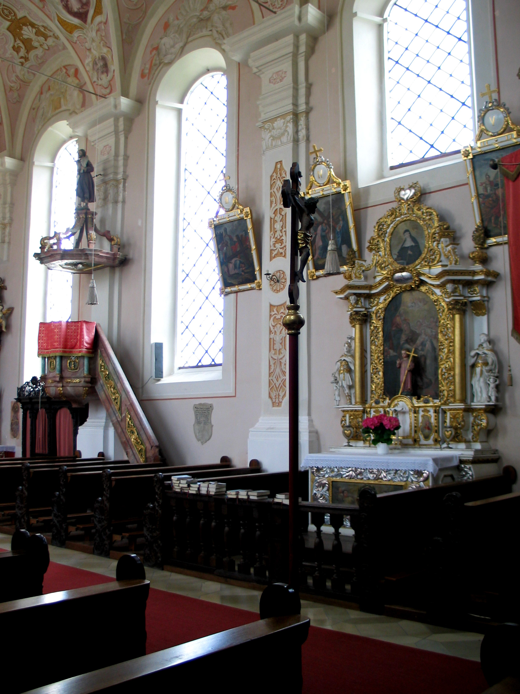 Thürnthenning, Kath. Filialkirche St. Johannes Nepomuk. Südliche Langhauswand.